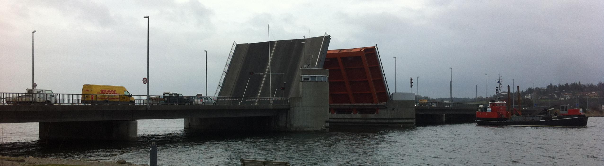 Hadsundbroen.